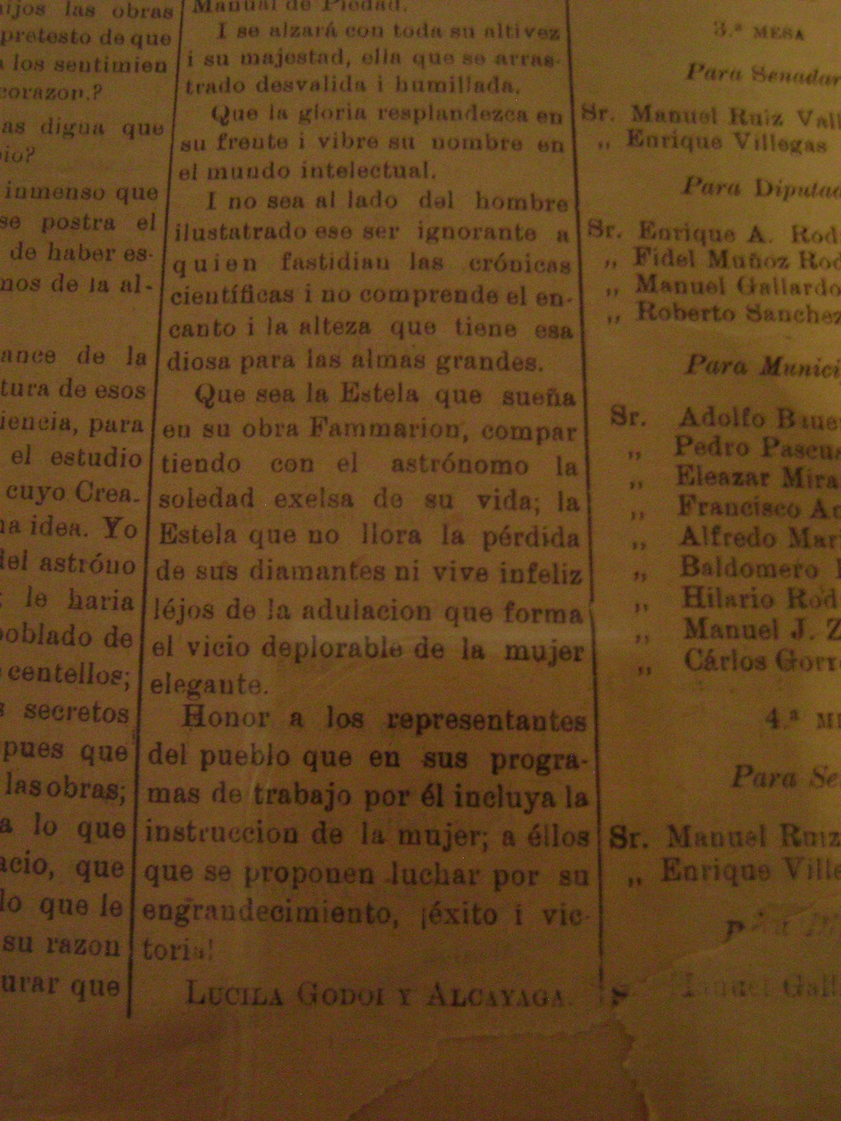 Publicación con el nombre real de Gabriela Mistral, Lucila Godoy Alcayaga